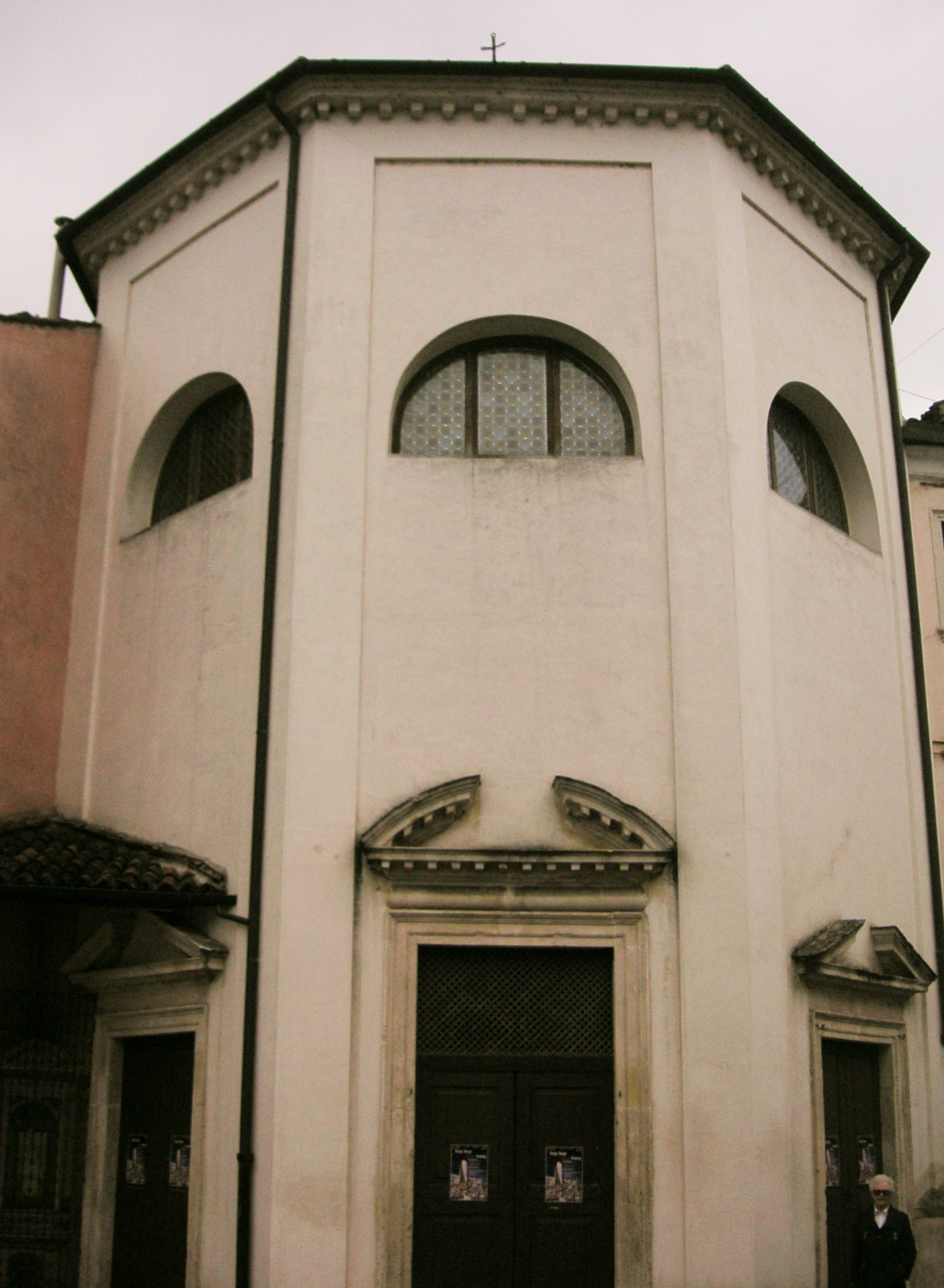 Oratorio delle Zitelle in Vicenza - metà del XVII secolo